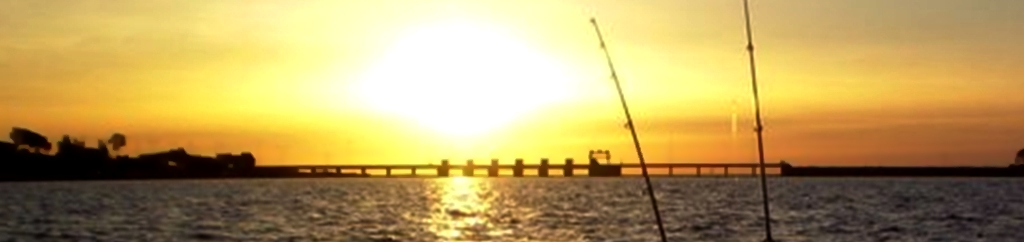 Dique Cruz del Eje , atardecer en bote